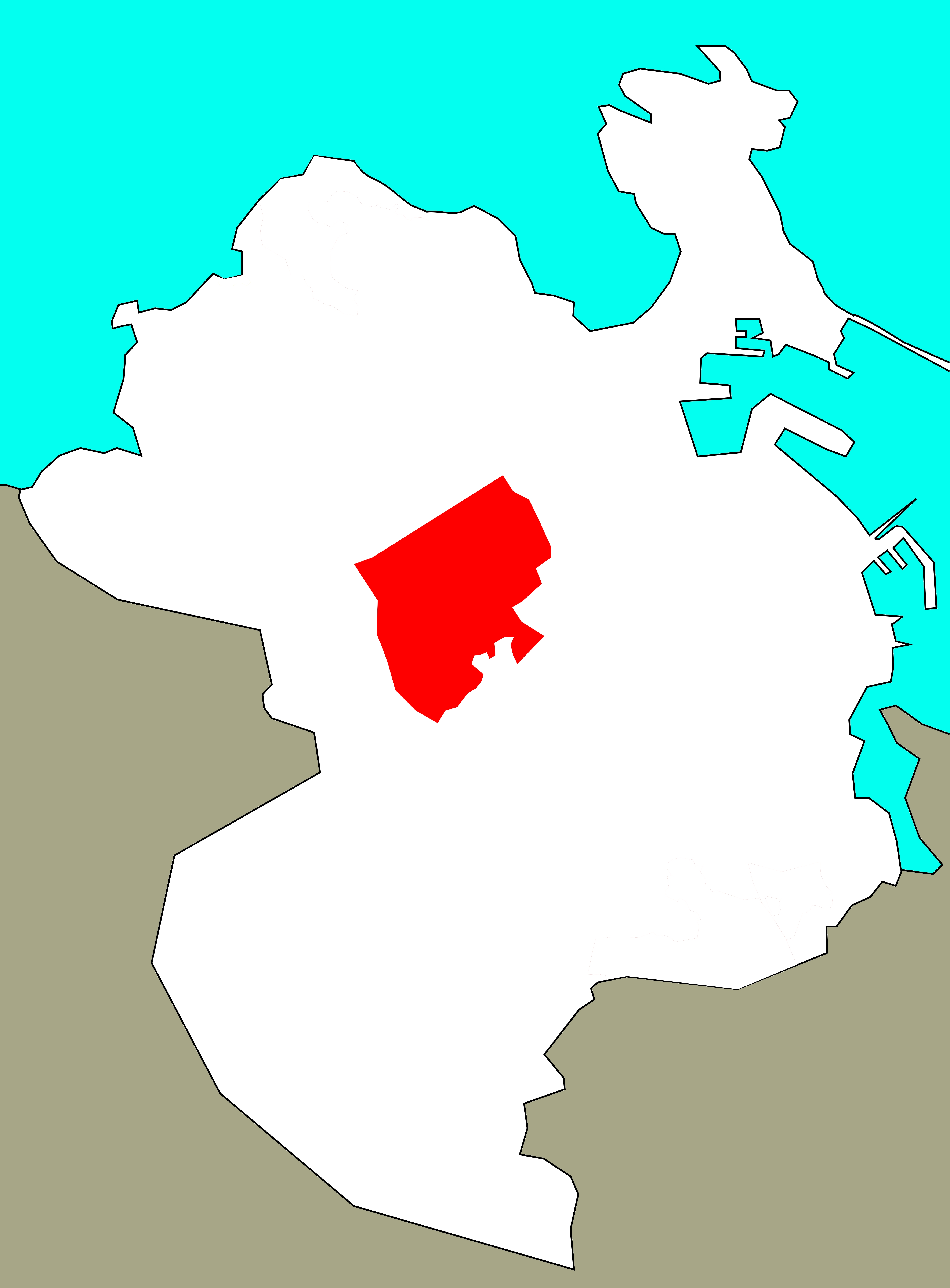 Situación do polígono de Agrela no concello da Coruña.[1]